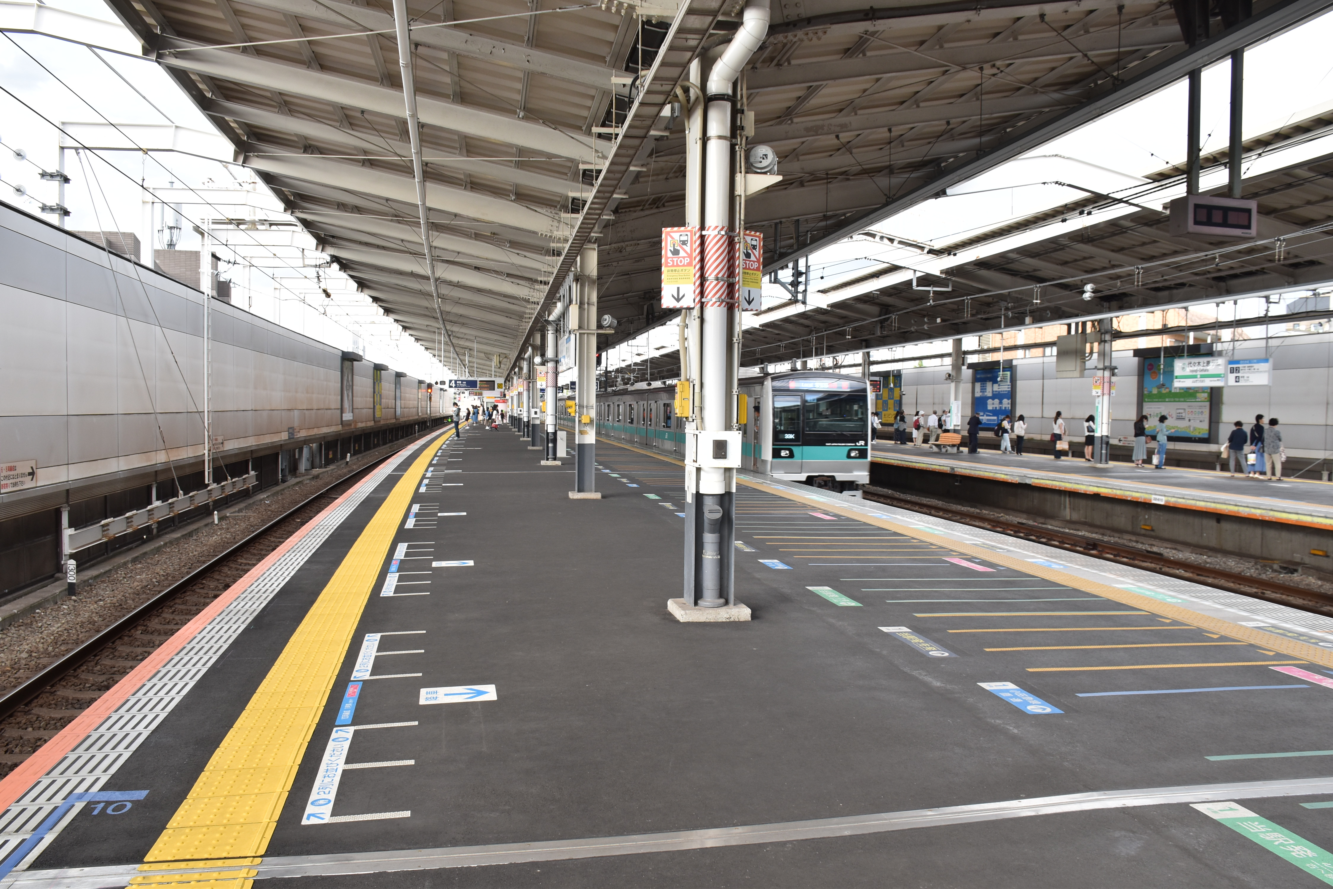 代々木上原駅上りホーム